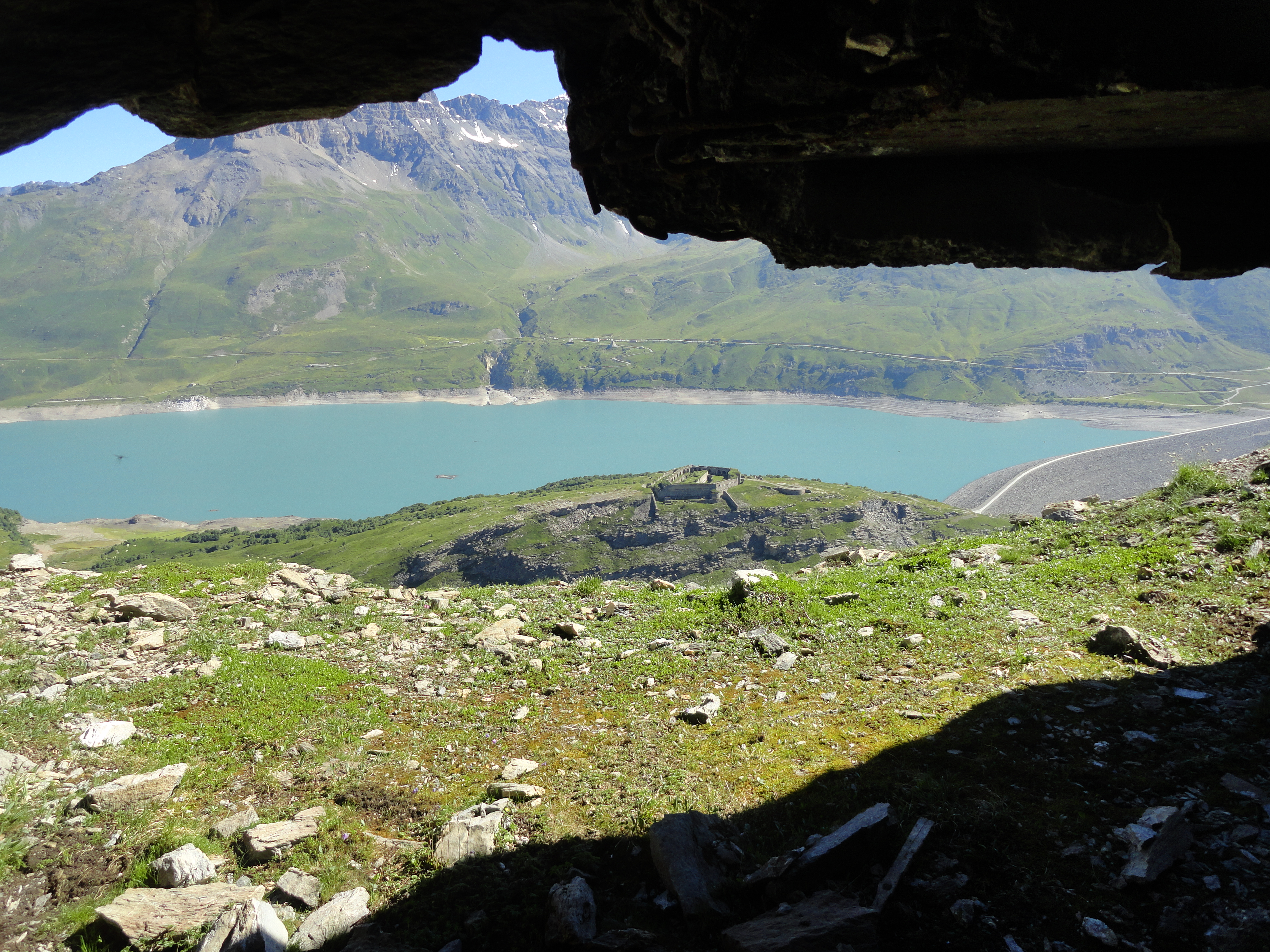 Il forte dalla Strada militare Bivio Varisello-Giaset-Malamot